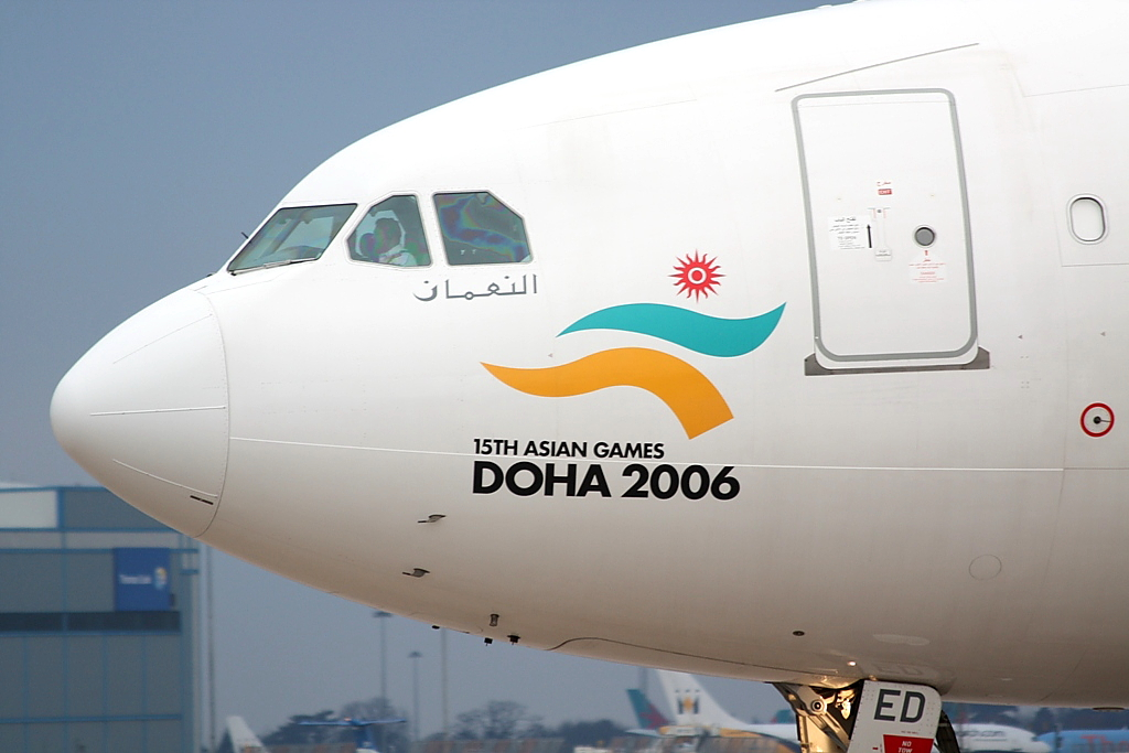 Qatar Airways A330